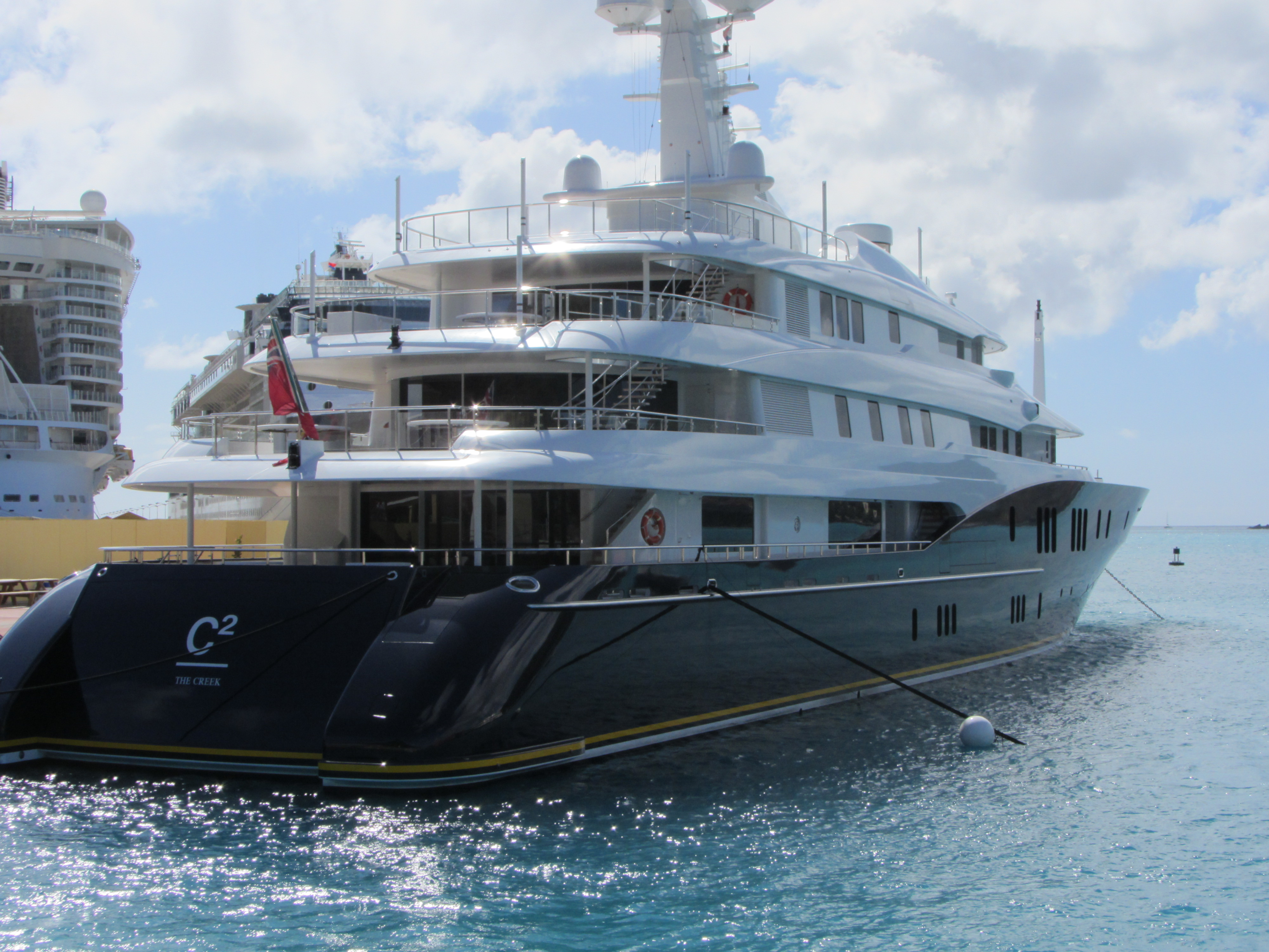 z.Z. (Stand 2012) Rang 63 größte Privatyachten